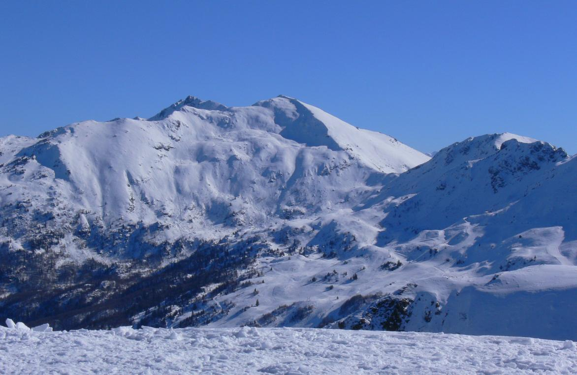 Le Pic de Saint-Barthélemy (au centre) vu depuis le Mont Fourcat. Légèrement sur la gauche, le Pic de soularac. Sur la droite, le Col de Girabal. A l'extrême droite, le Pic de Girabal.